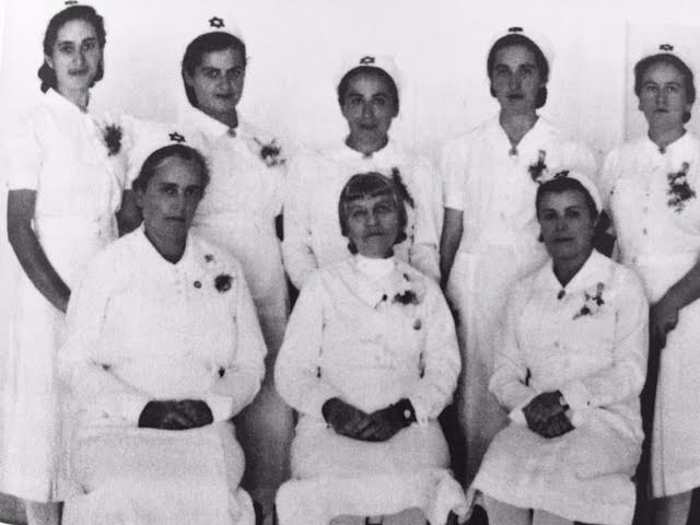 בוגרות הקורס הראשון לאחיות חדר הניתוח בהר הצופים בשורה התחתונה עדה נאמנה, ברטה לנדסמן ושלומית קנטור